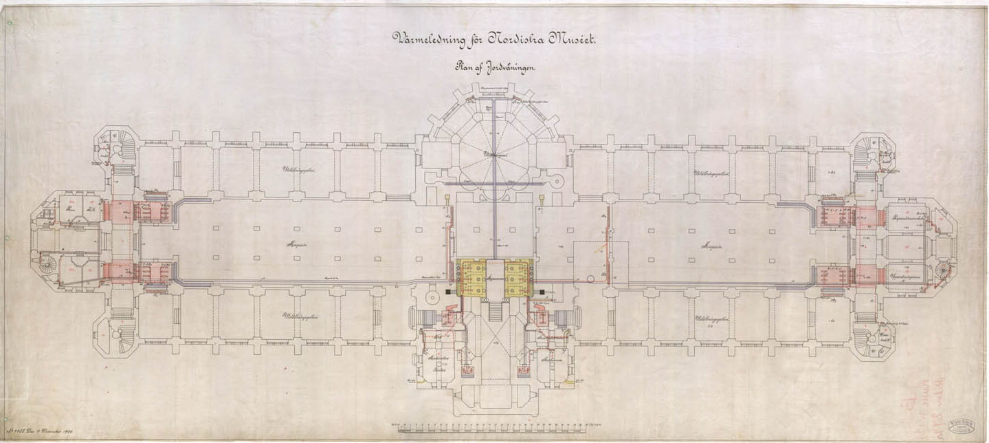 Depicted place: Stockholm, Nordiska museet, Djurgården (Sverige (SE))